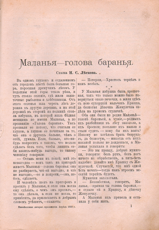 Первая публикация сказки Н. С. Лескова "Маланья - голова баранья" в "Ежемесячных литературных приложениях к журналу "Нива", апрель, 1899